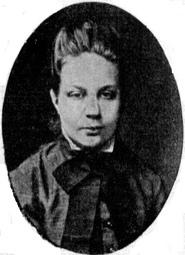 Aleksandra Ivanovna Kornilova Morozova (1853 – 1938)